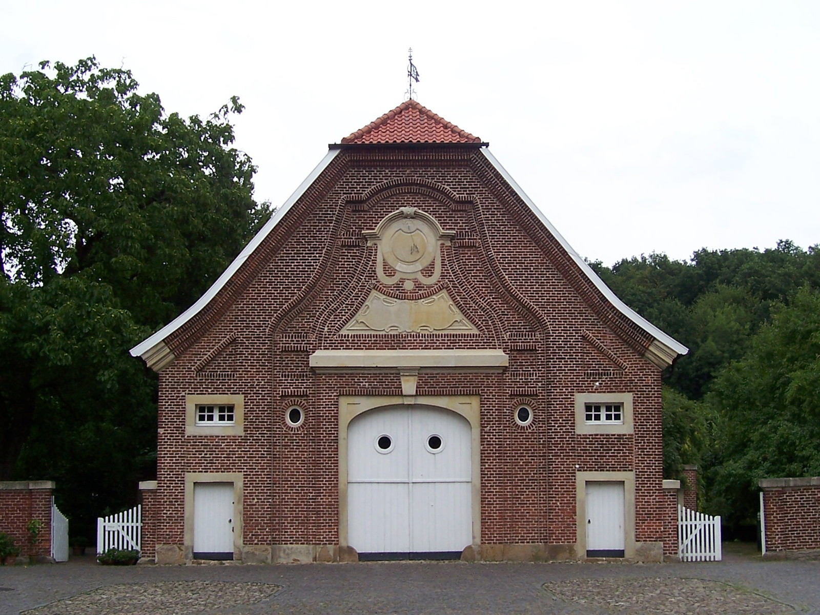 Haus Rüschhaus in Münster front